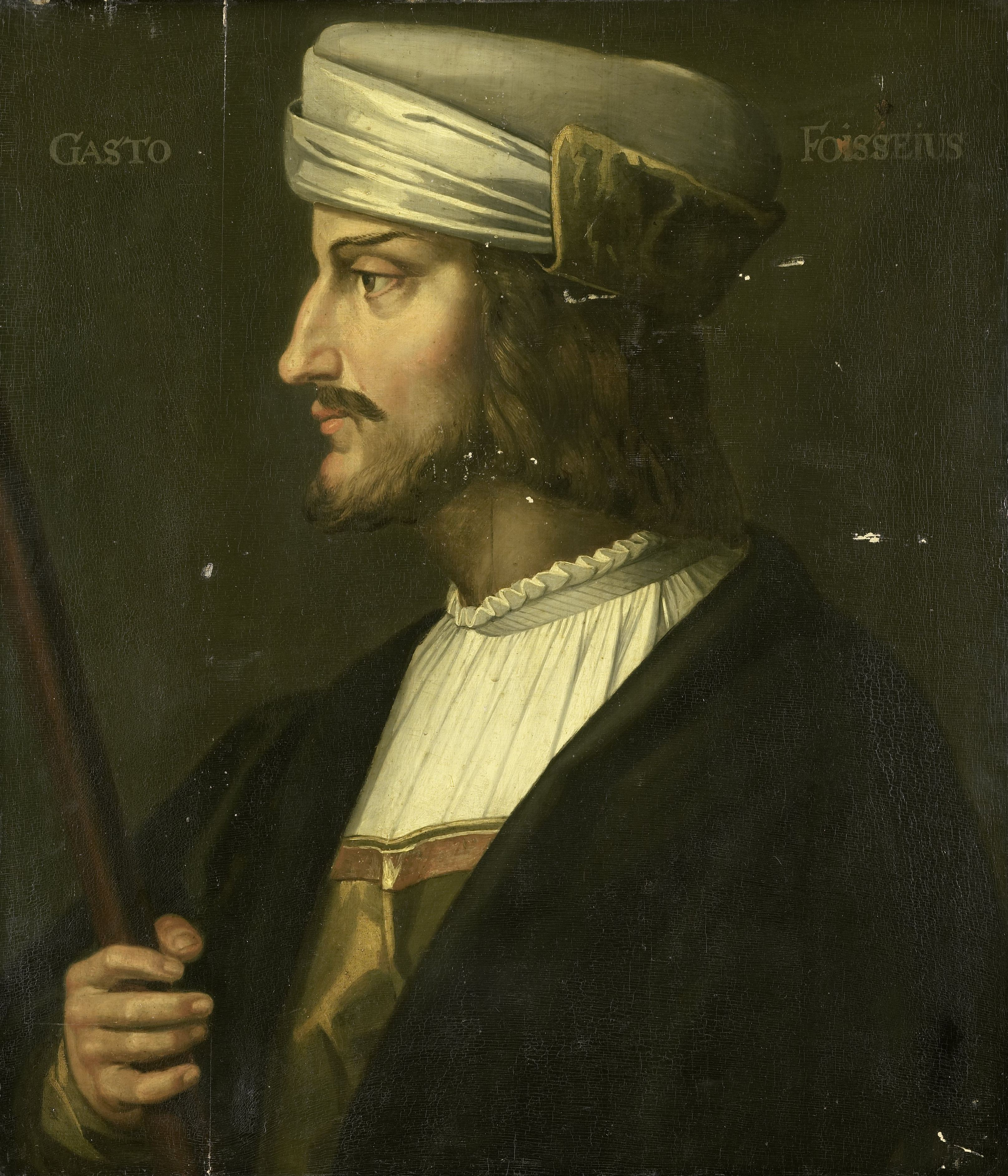 IdentificatieTitel(s): Gaston de Foix (1489-1512). Frans legeraanvoerderObjecttype: schilderij Objectnummer: SK-A-504Opschriften / Merken: inscriptie, boven: ‘Gasto Foisseius’Omschrijving: Portret van Gaston de Foix (1489-1512), frans legeraanvoerder. Buste in profiel naar links. Late kopie naar een onbekend origineel.VervaardigingVervaardiger: schilder: anoniemPlaats vervaardiging: FrankrijkDatering: 1600 - 1799Fysieke kenmerken: olieverf op paneelMateriaal: paneel olieverf Afmetingen: drager: h 53,2 cm. × b 46 cm. × d 1,5 cm. buitenmaat: d 2,4 cm. (drager incl. SK-L-3349)Verwerving en rechtenVerwerving: nationalisatie 1795 sep-1798Copyright: Publiek domein